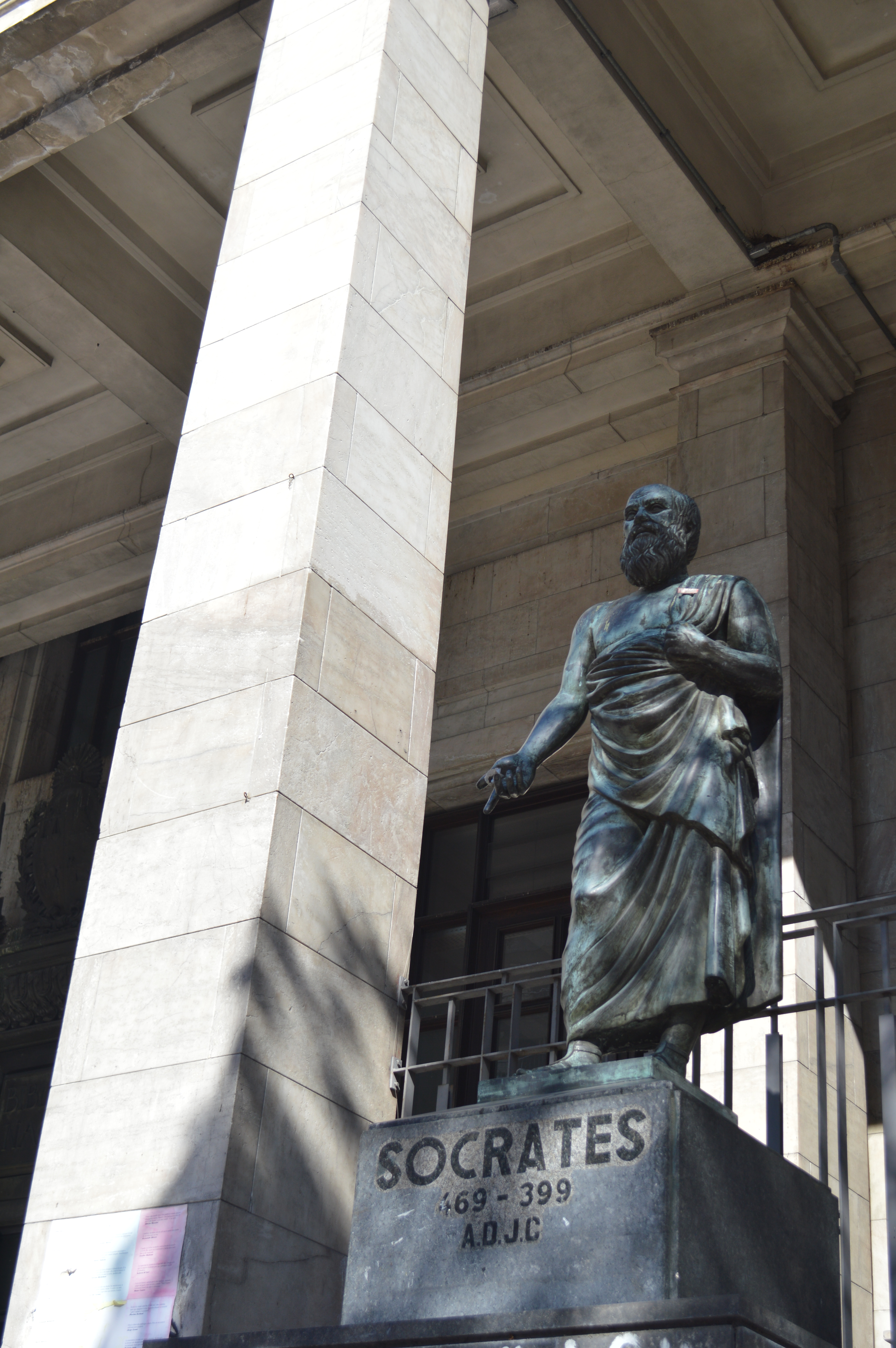 Sócrates. Ubicada en el departamento de Montevideo